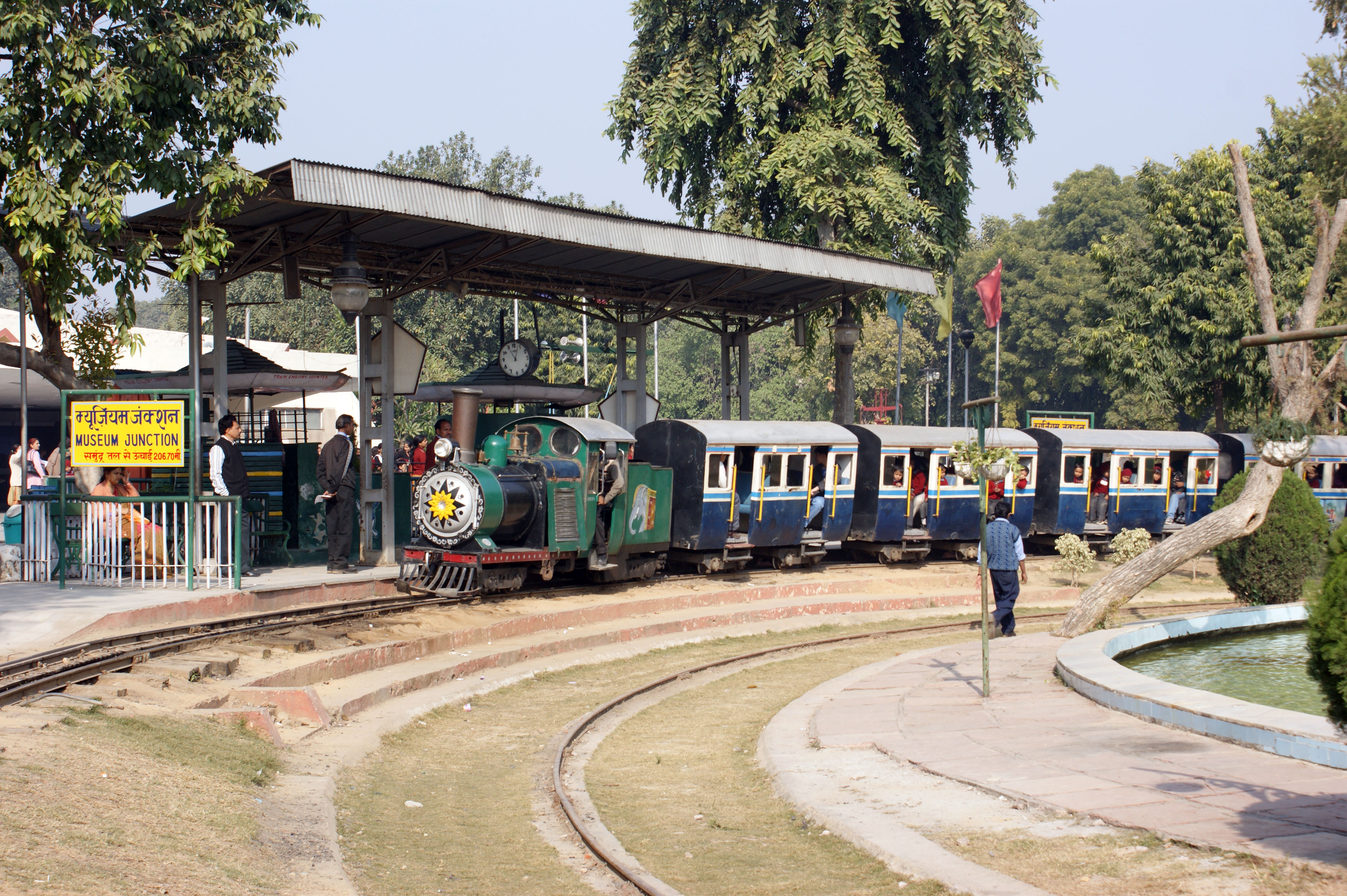 National Rail Museum de New Delhi. La gare du mini train qui permet de parcourir les 11 hectares du site du musée.